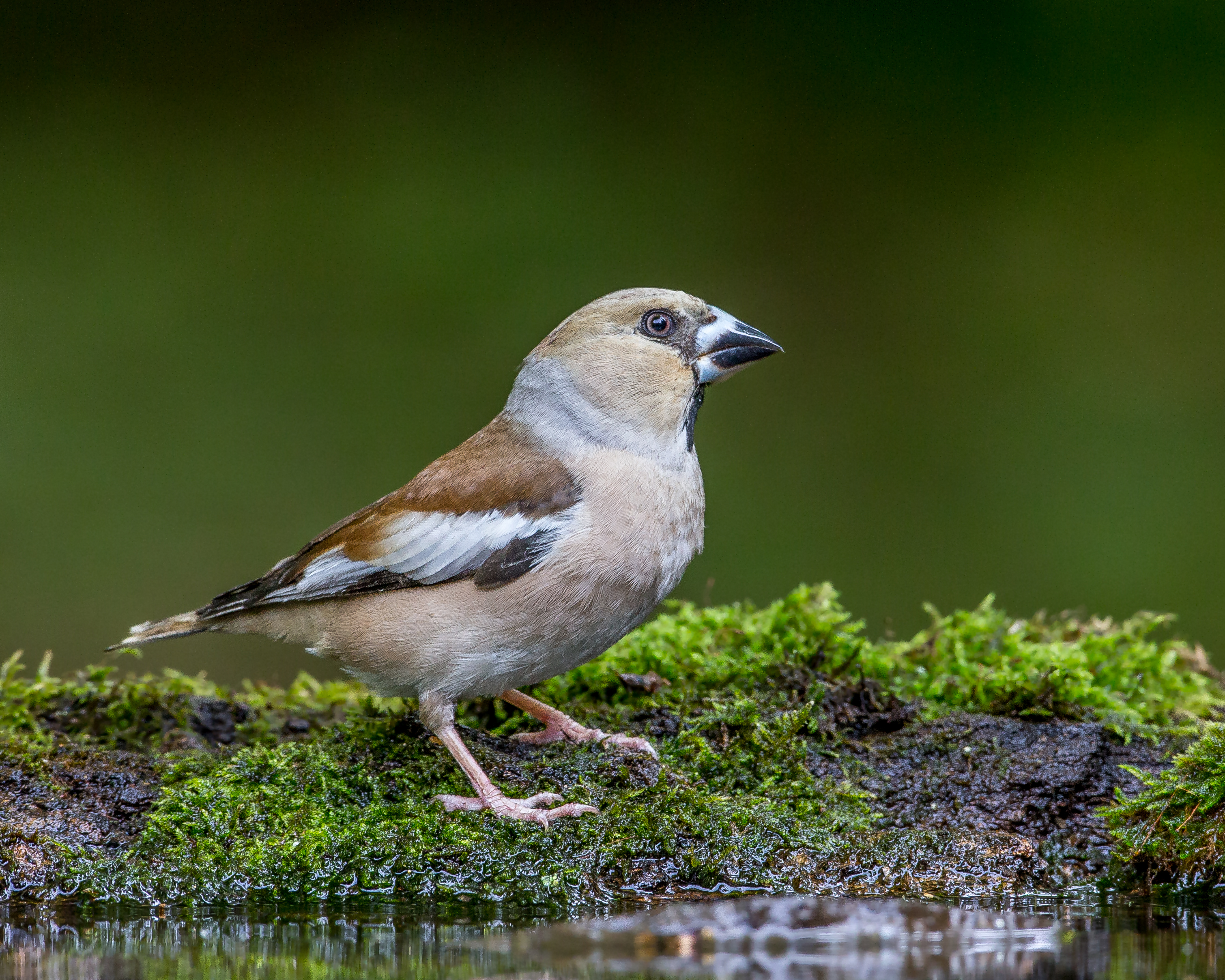 Taken in Hungary.